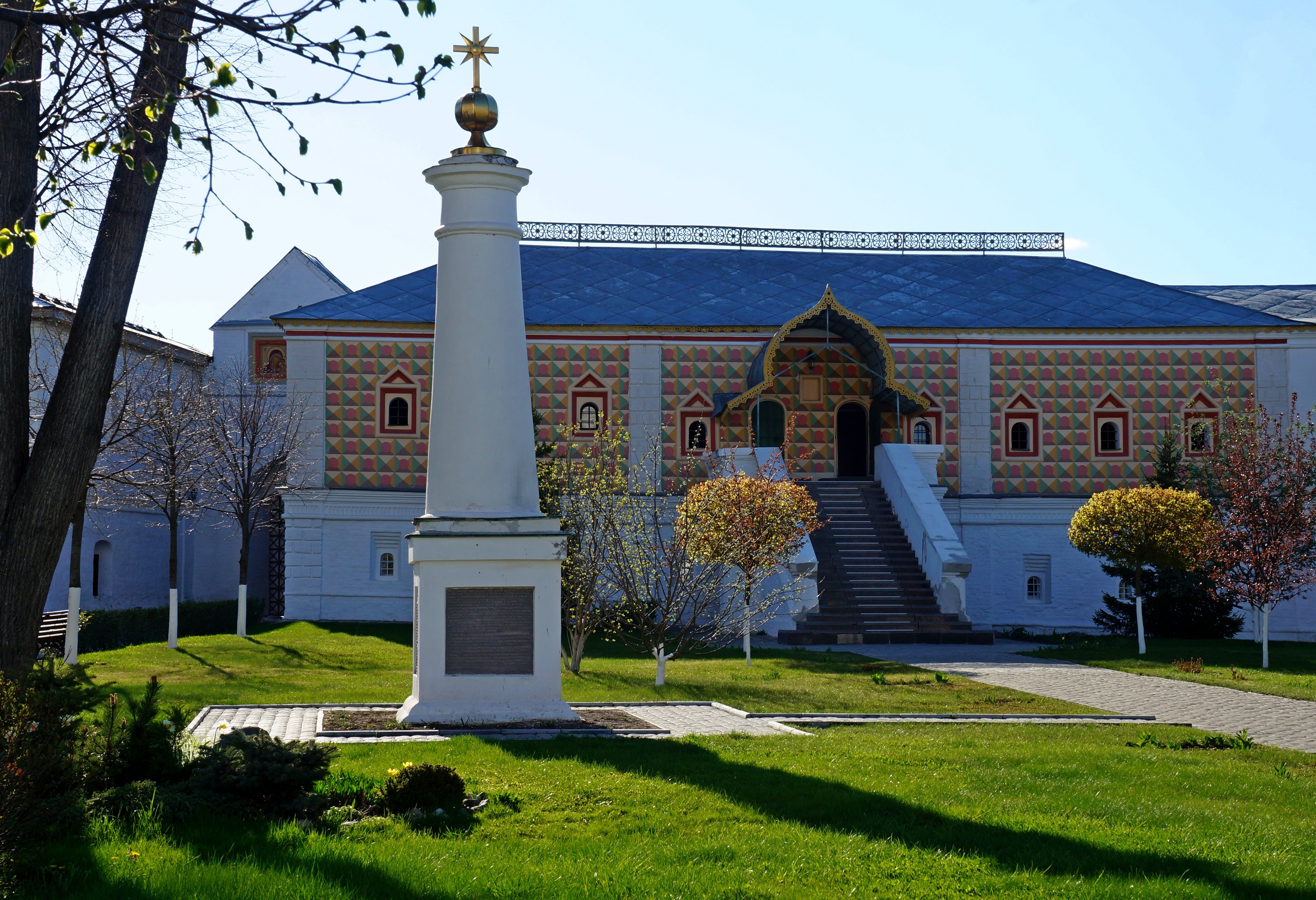 Корпус келарский (палаты бояр Романовых): улица Просвещения, 1, Кострома, Костромская область